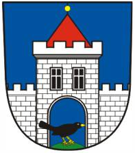 Znak obce Kosova Hora